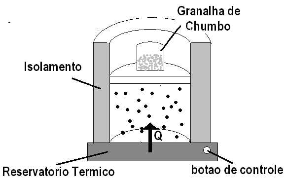 Reservatorio Termico 2,Gustinho Rossi